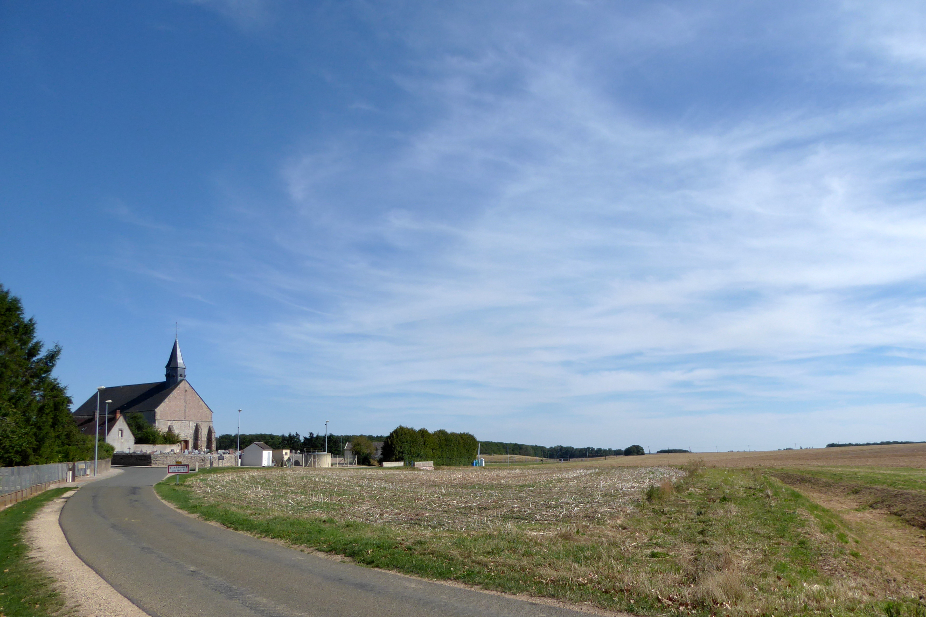 église Saint-Arnoult, Saint-Arnoult-des-Bois, Eure-et-Loir (France). Sur la droite, le lit (à sec) du Coisnon.